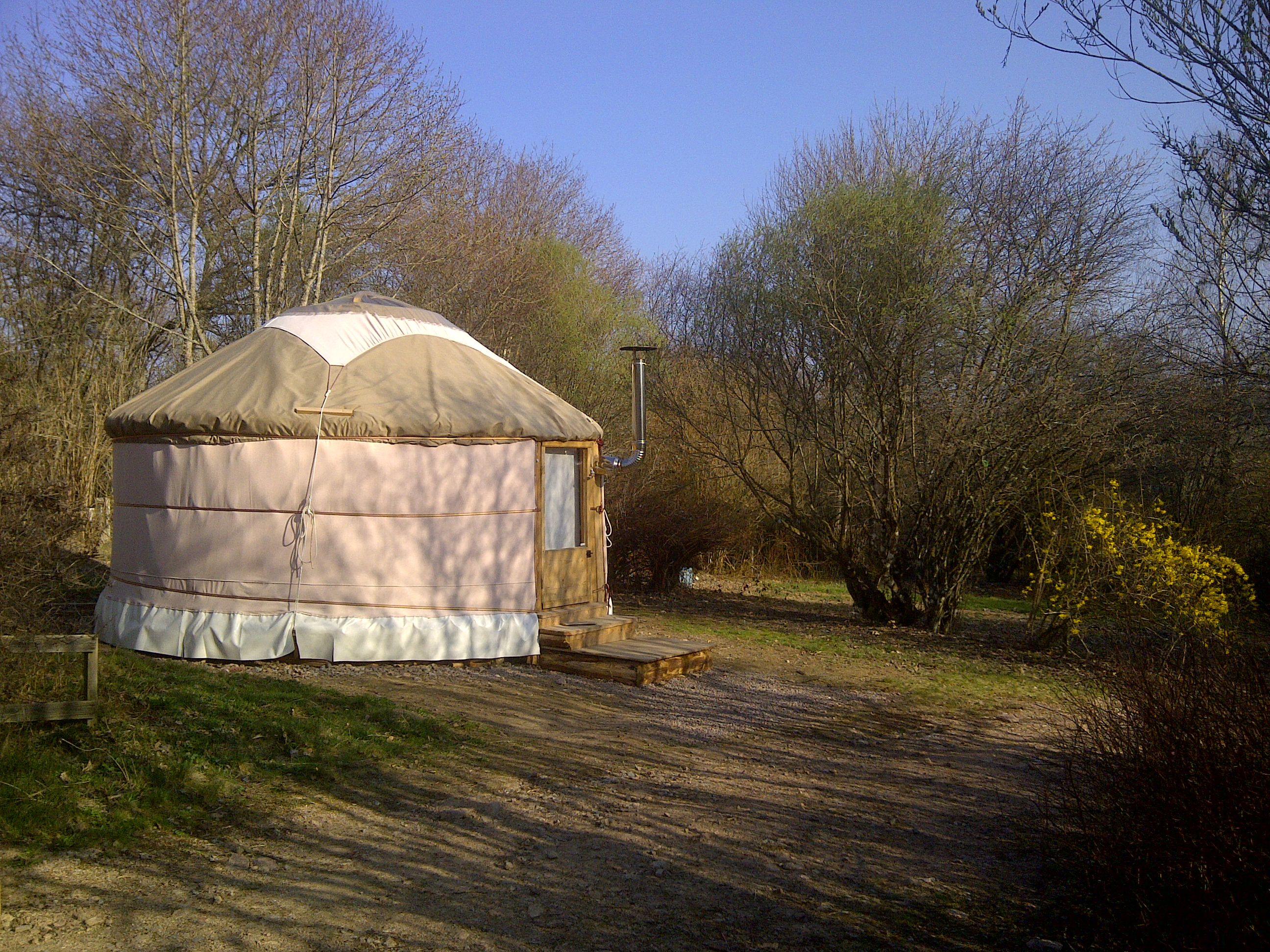 la yourte la plus mignone avec une vue magnifique sur les étoilles